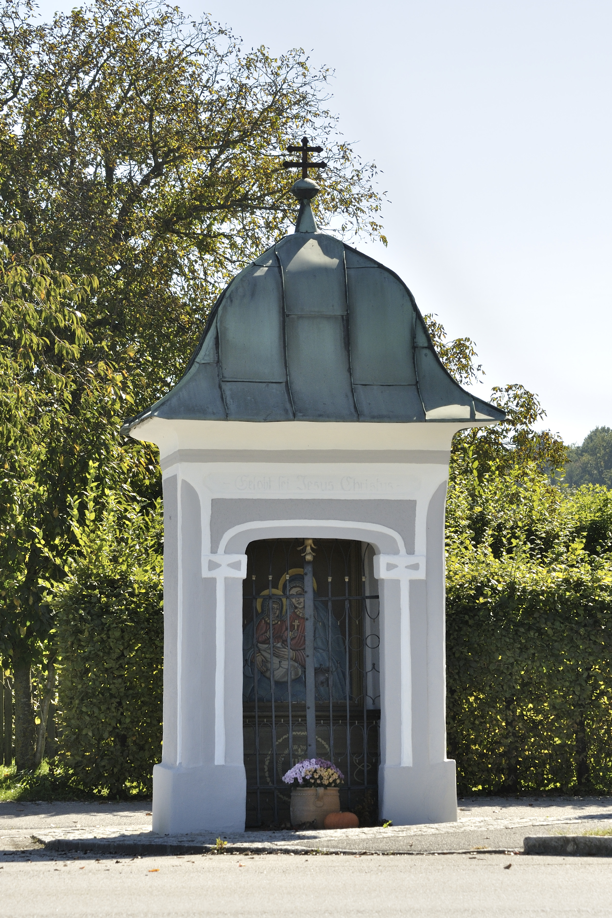 Kapellenbildstock beim Wirtshaus Schupf´n, Rohr im Kremstal